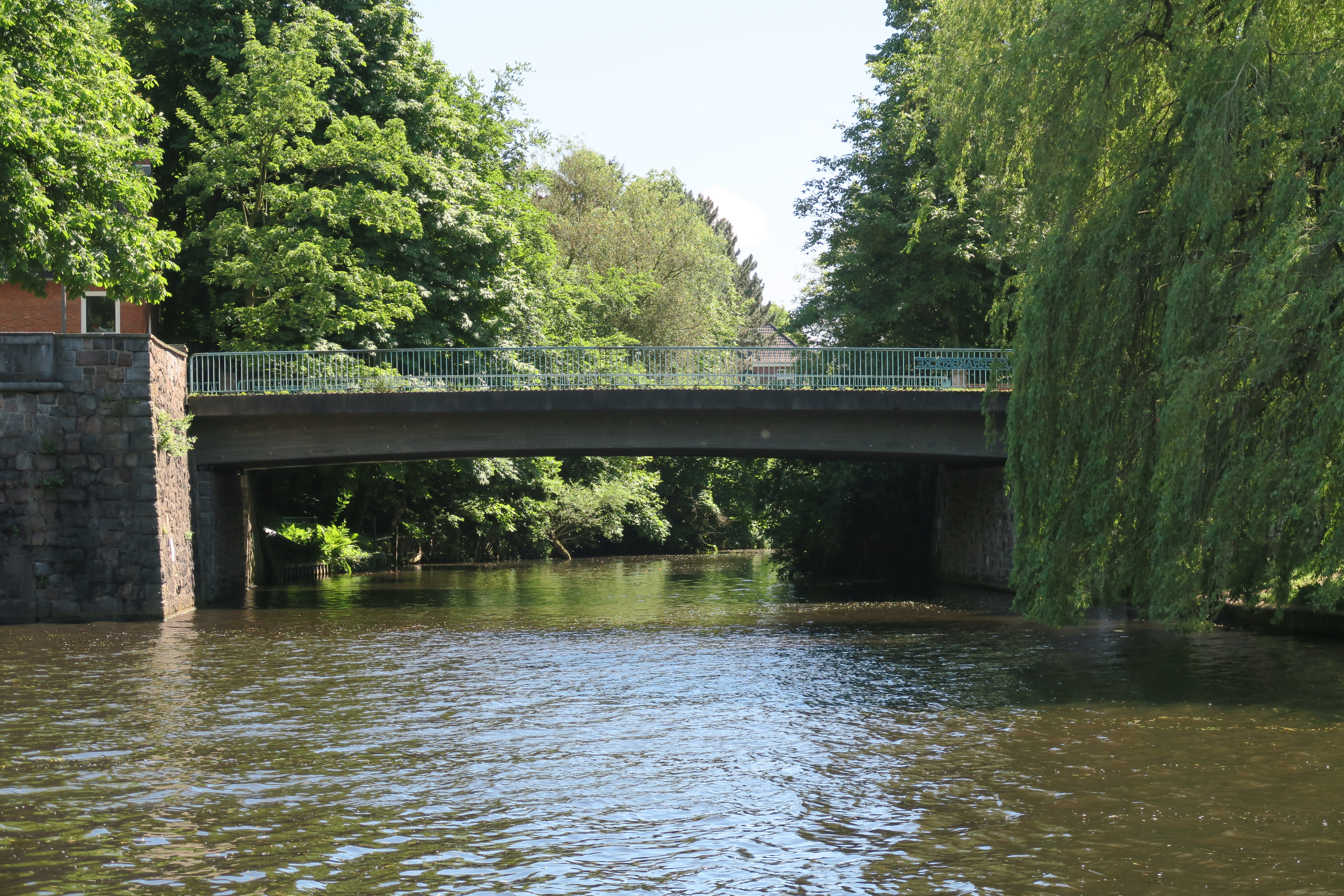 Skagerrakbrücke, Nordseite, in Hamburg-Alsterdorf